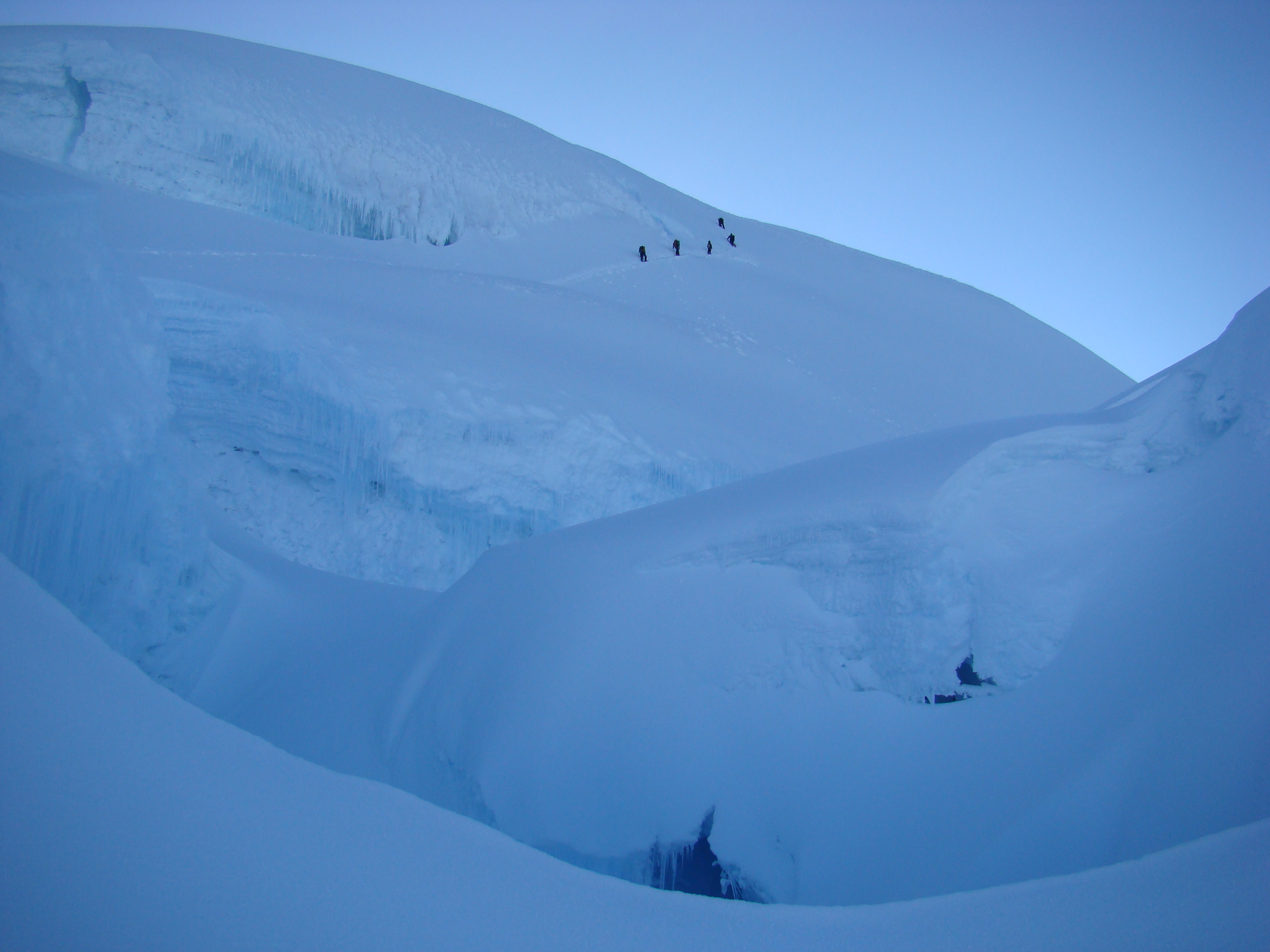 Routenverlauf kurz unter dem Gipfel.